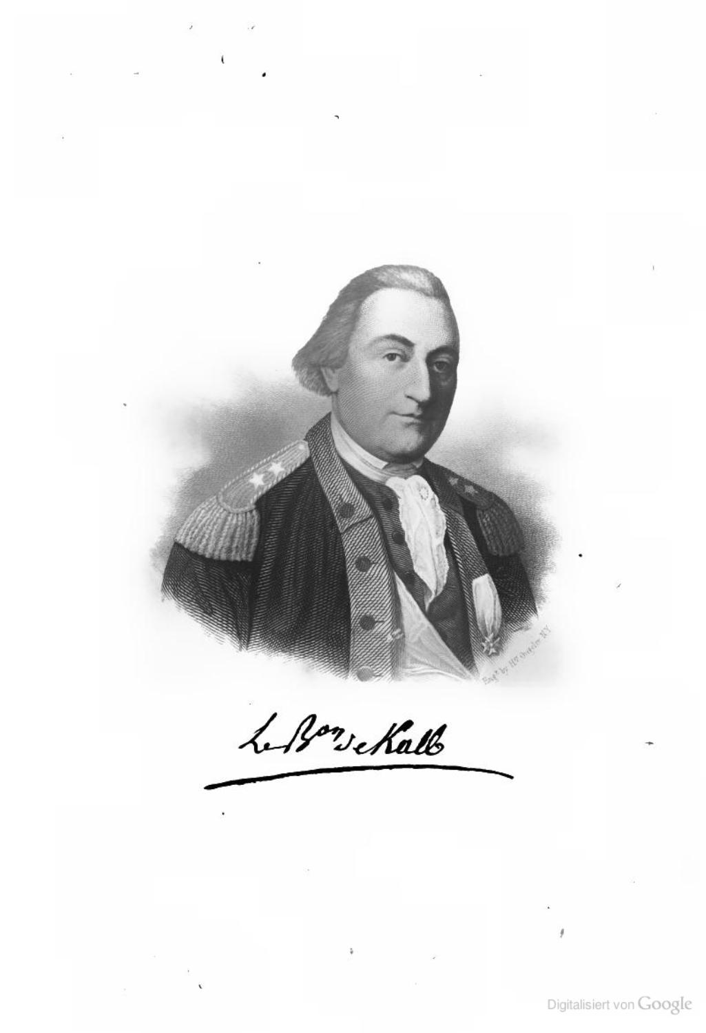 Johann von Kalb (* 29. Juni 1721; † 19. August 1780) deutsch-amerikanischer General während der Amerikanischen Revolution